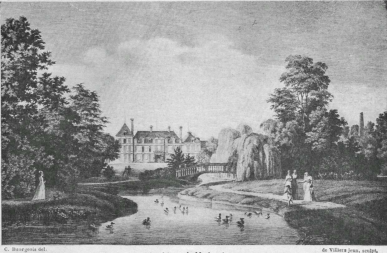 Le château de Morfontaine demeure de Joseph Bonaparte. Gravure du XIXe siècle.